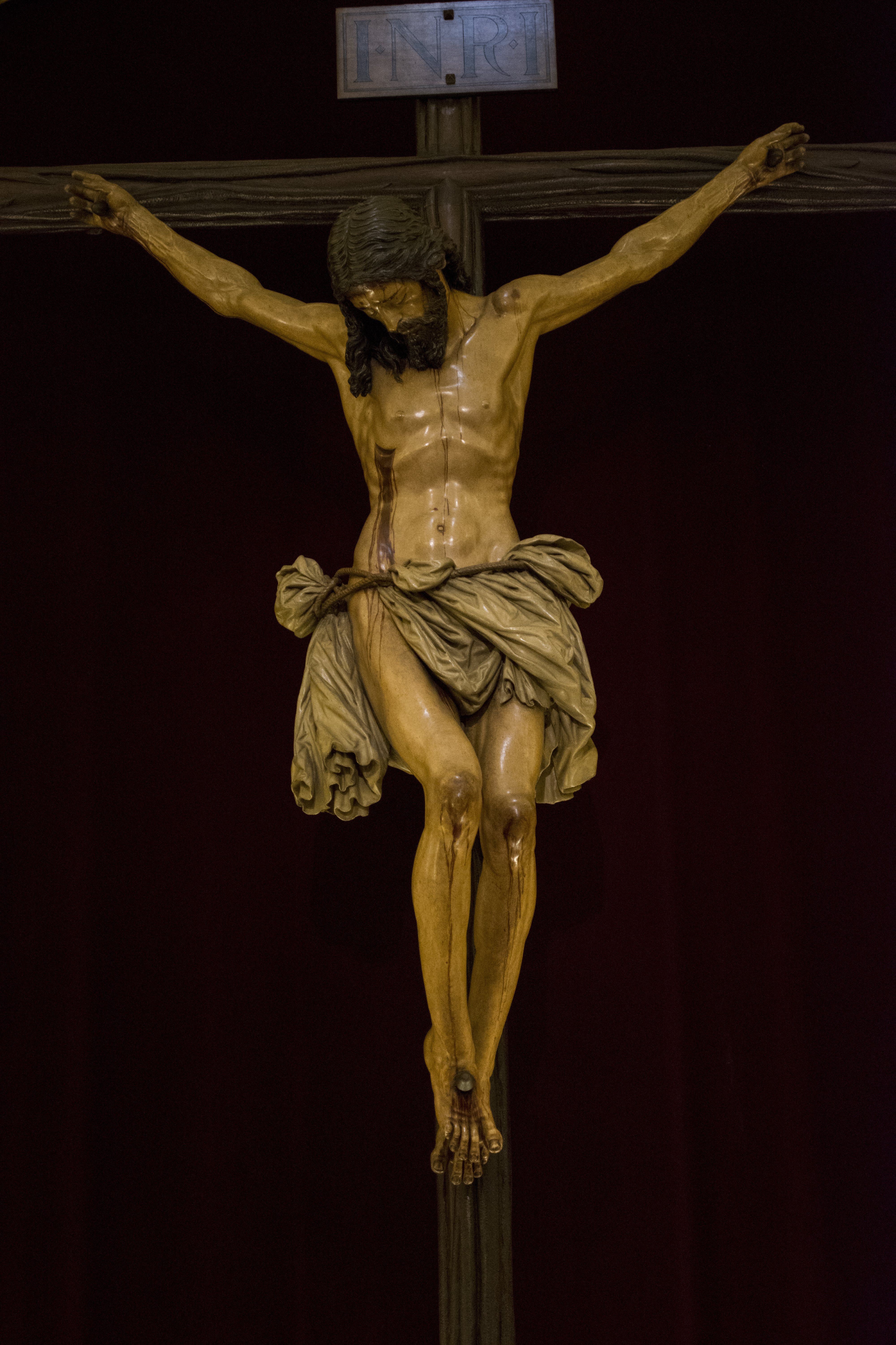 Cristo de la Buena Muerte (1620). Obra de Juan de Mesa. Capilla de la Universidad de Sevilla.